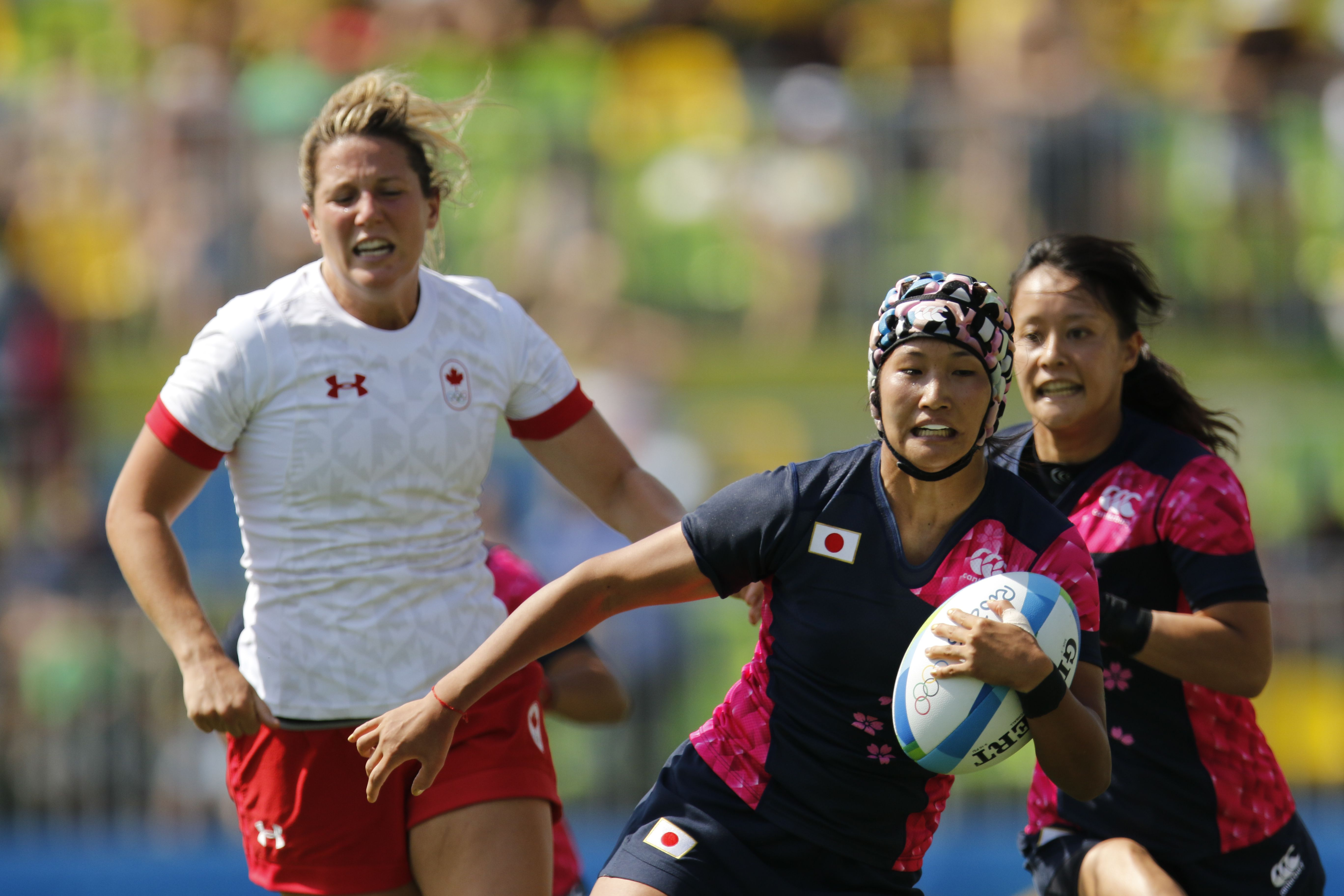 Rugby feminino: Canadá vence Japão por 45 a 0